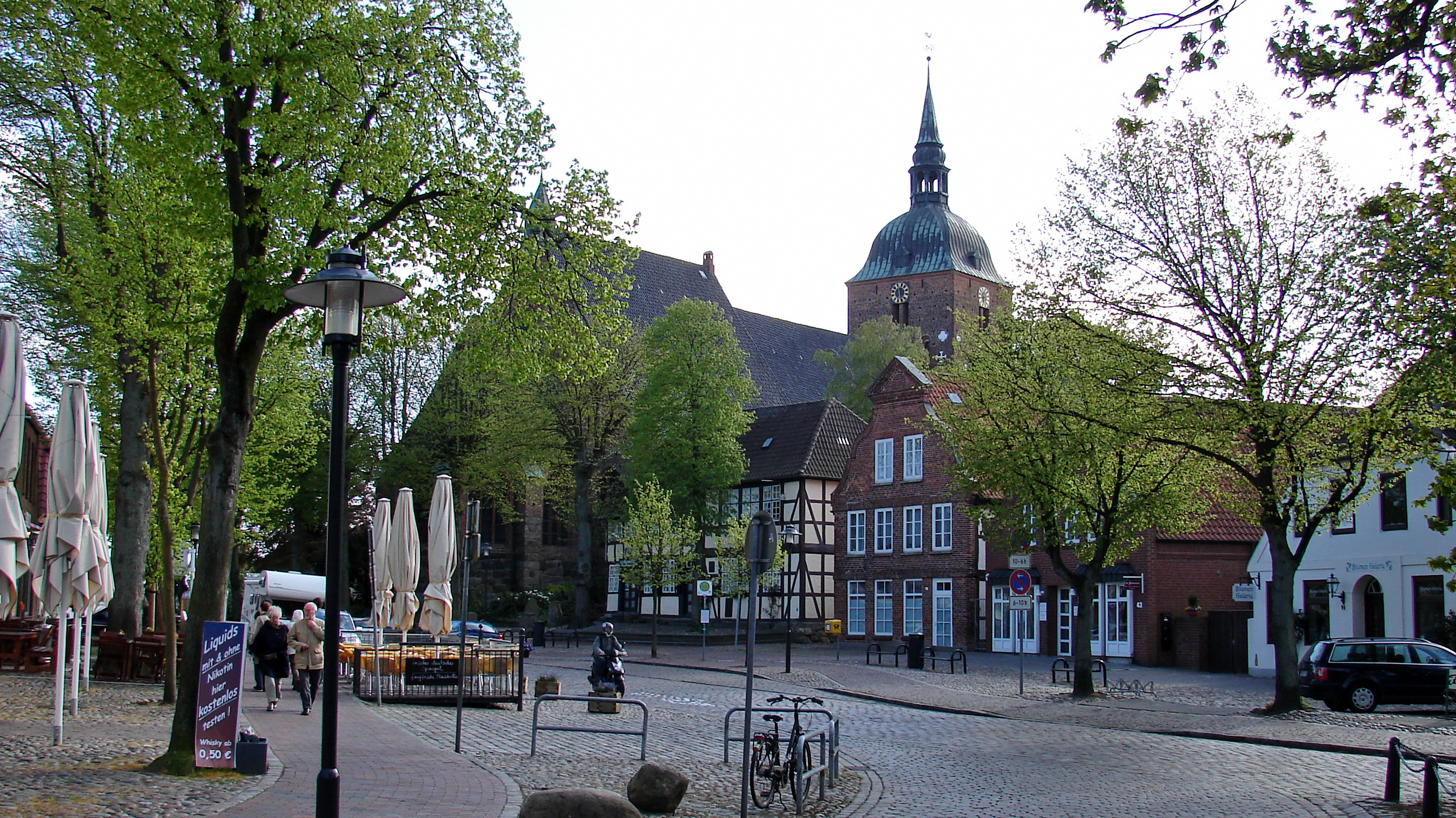 Burg auf Fehmarn (plattdeutsch: Borg up Fehmarn, dänisch: Burghæby) ist der zentrale Stadtteil der Stadt Fehmarn. Bis 2003 war die Kleinstadt eigenständig. Der Ort liegt auf der Insel Fehmarn im Kreis Ostholstein in Schleswig-Holstein.